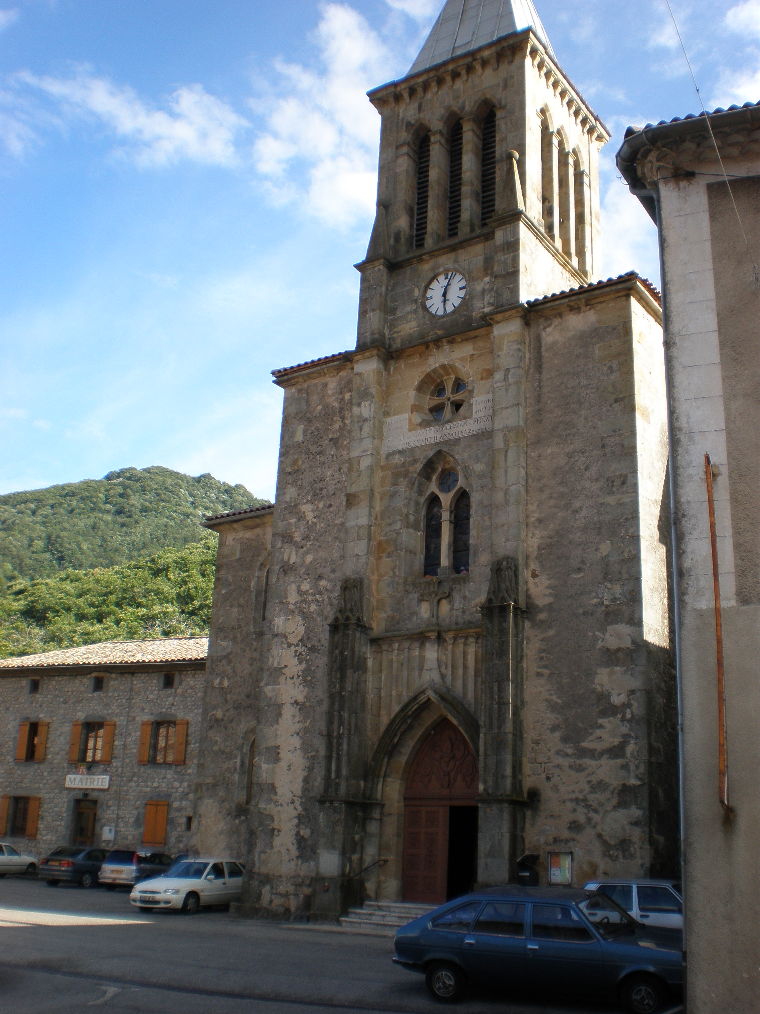 Eglise de Mayres (Ardèche)